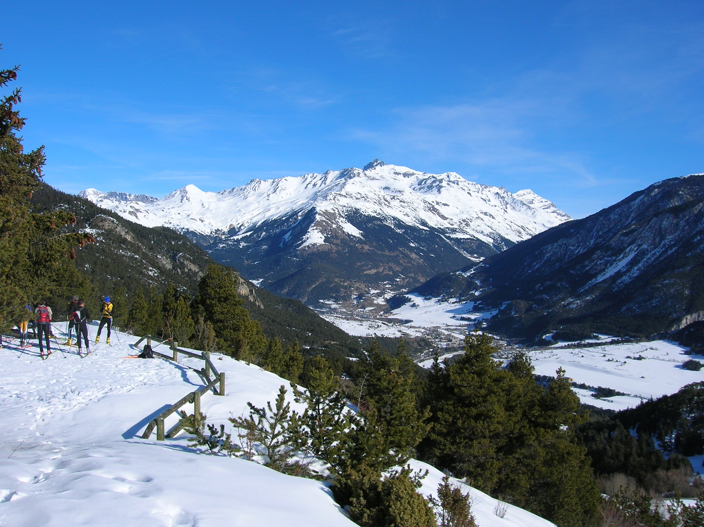 Grand Roc Noir depuis Aussois